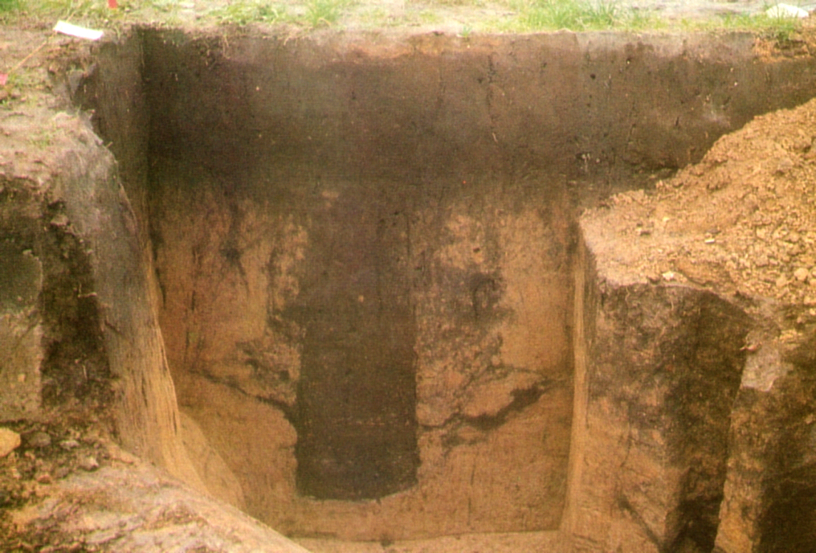 Bandkeramische Siedlung auf dem Mühlengrund in Rosdorf, Standspur eines Firstpfostens des Gebäudegrundrisses XXVI, die Sohle der Pfostengrube liegt 1,67 Meter unter der heutigen Oberfläche